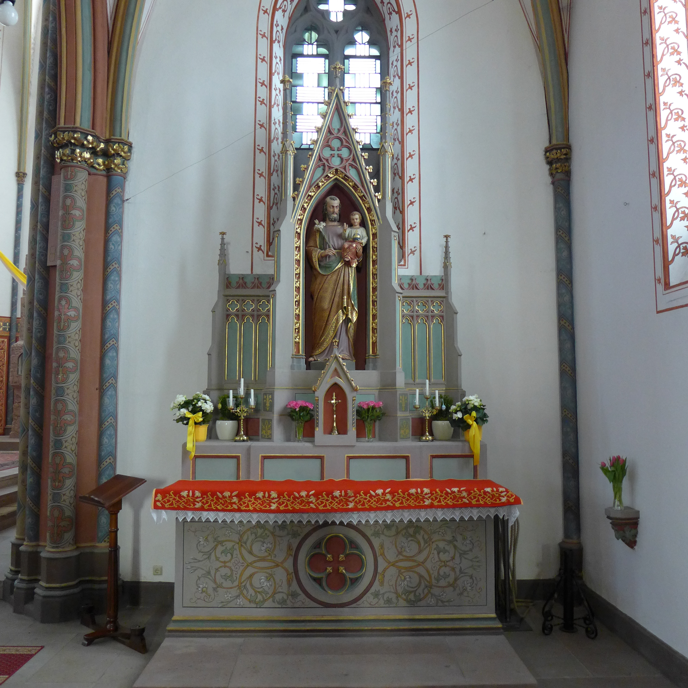 St. Katharina (Wallerfangen), Josefsaltar